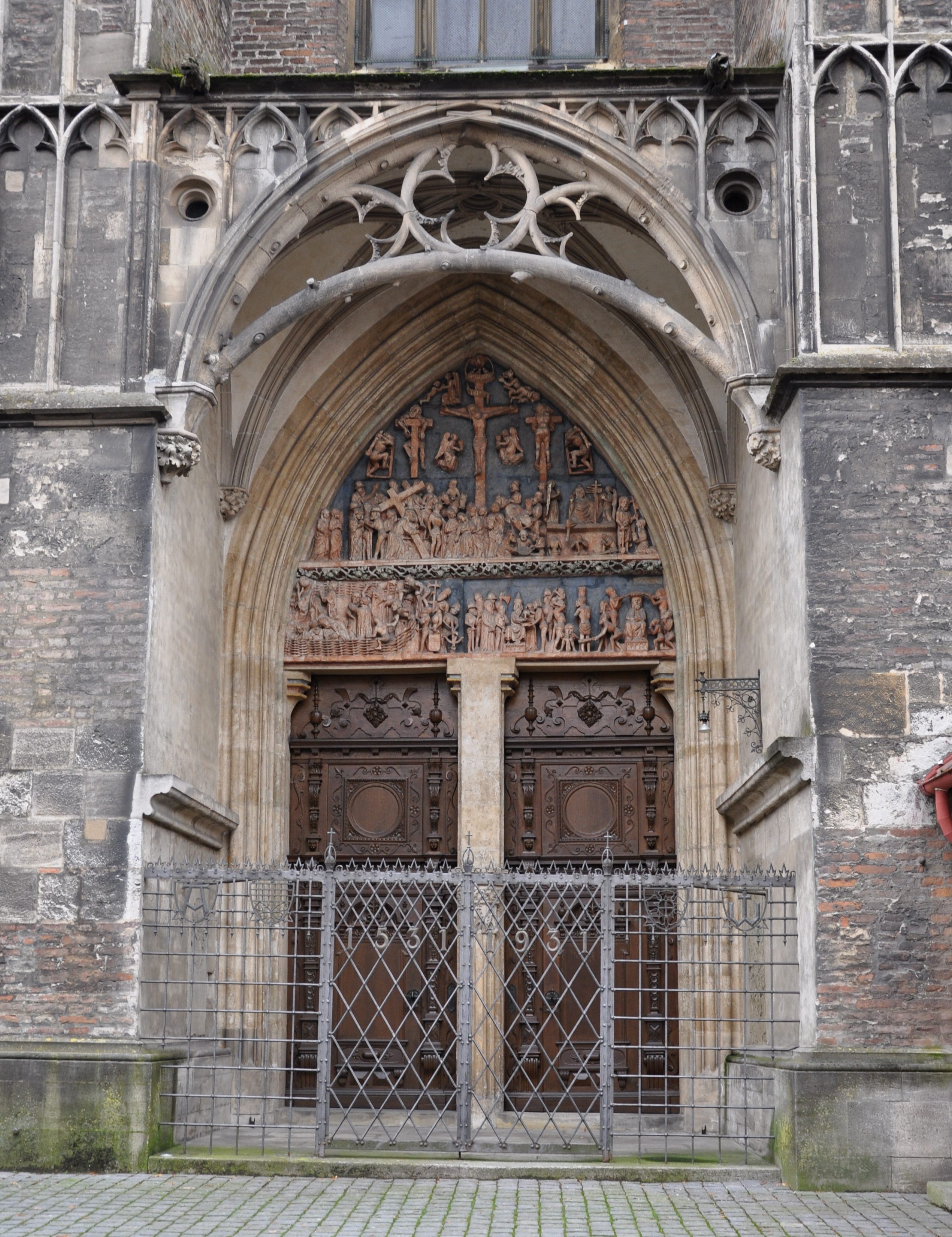 Ulm, Ulmer Münster, Passionsportal